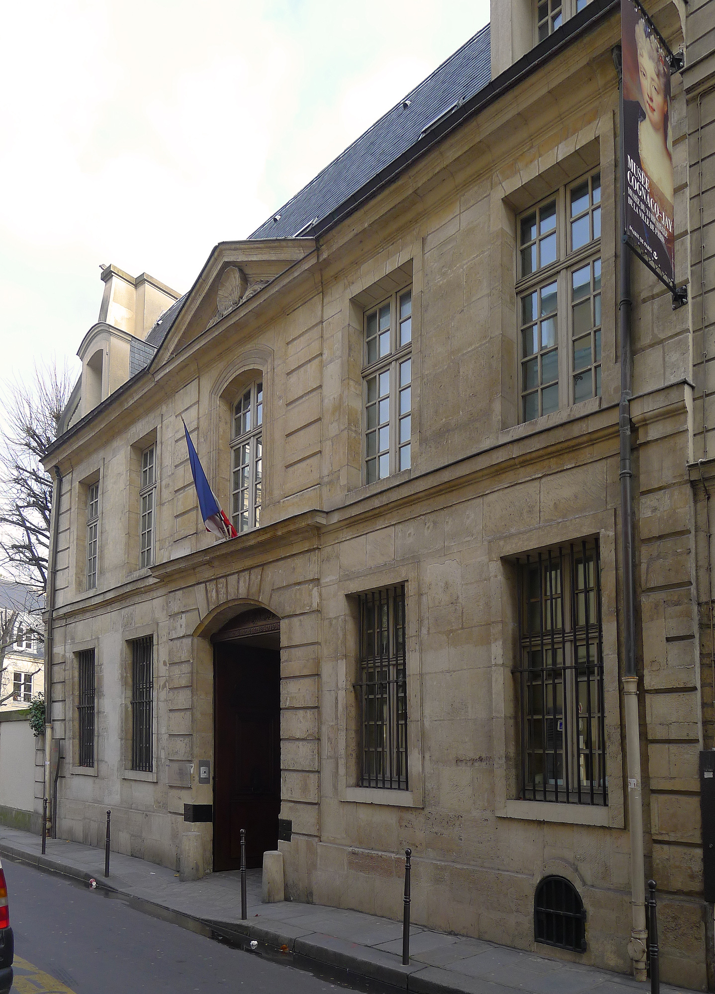 Rue Elzevir n°8 Hôtel de Donon - Paris III